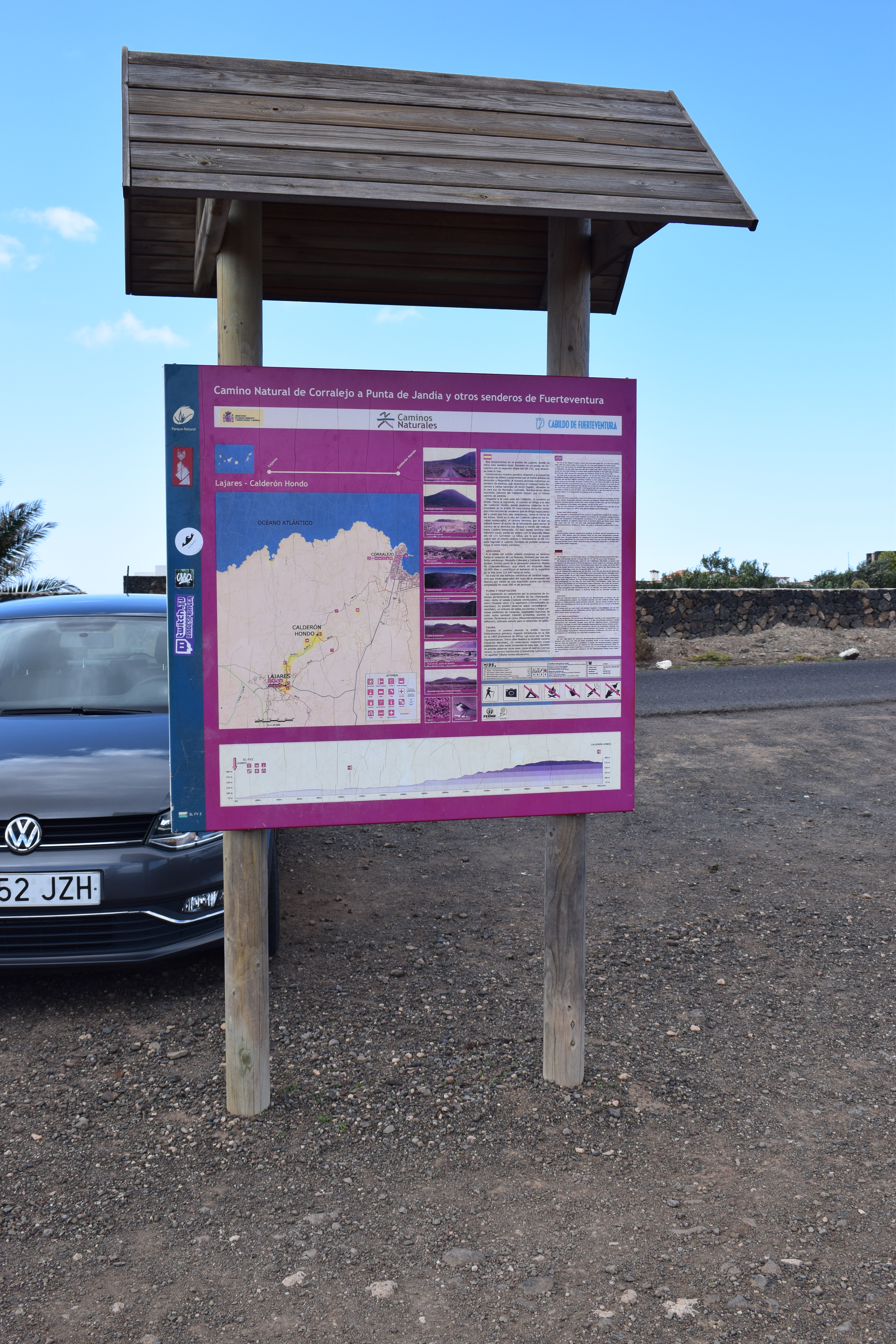 Wandertafel am Beginn des lokalen Wanderwegs SL FV 2 (Calderón Hondo - Lajares) in Lajares, la Oliva, Fuerteventura.